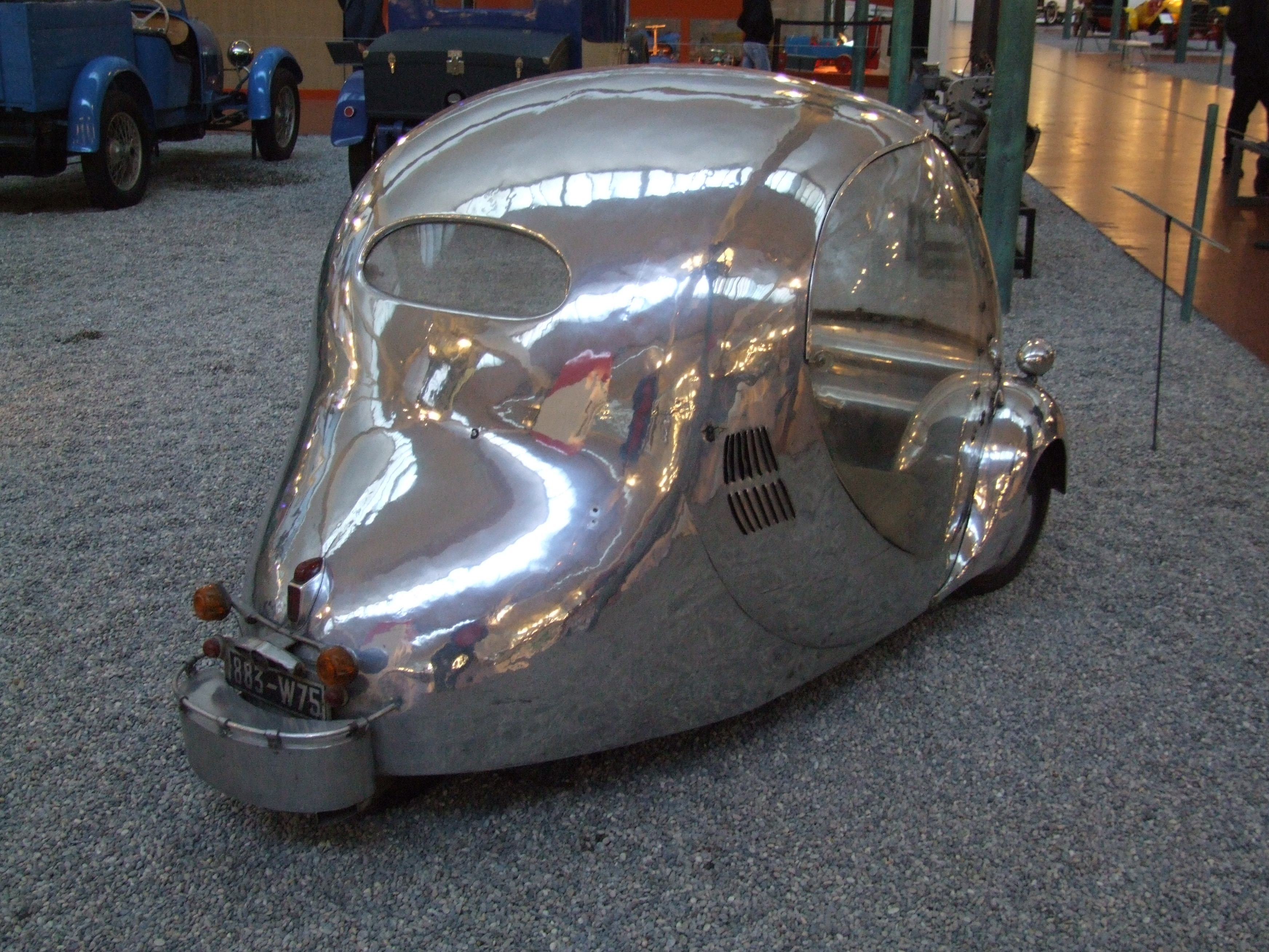 Paul Arzens Ouef von hinten